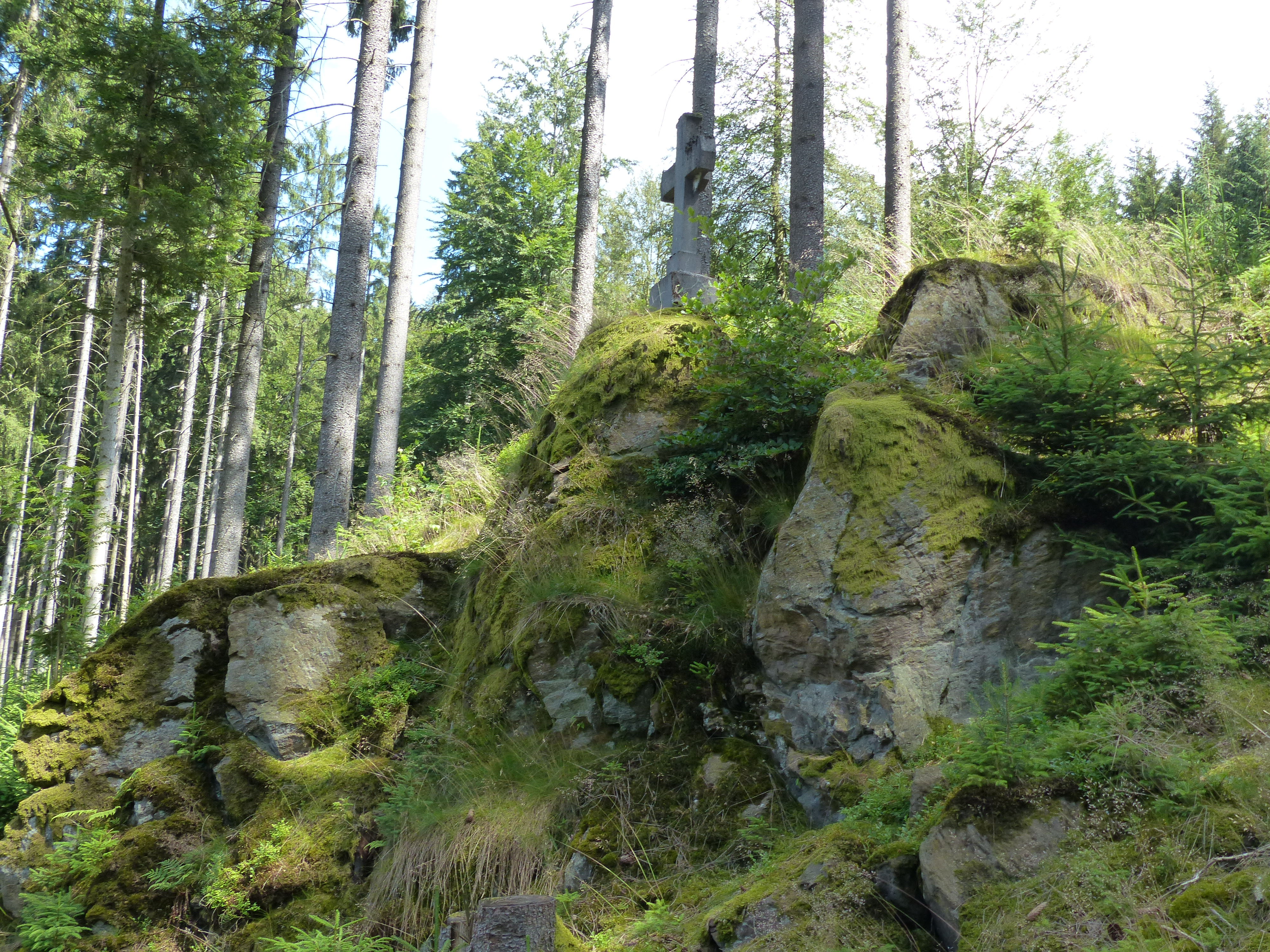 Kreuz als Denkmal am Weißenstein